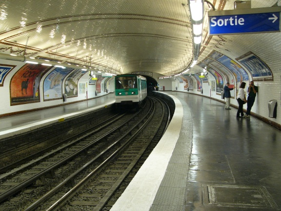 Metro de Paris ligne 12 station Lamarck Caulaincourt